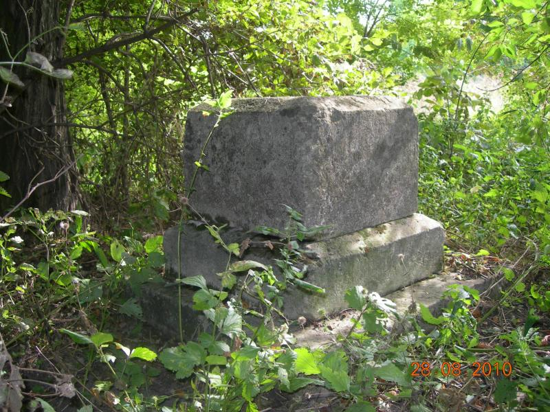 Підстава до хреста в Великому Полюхові під Сенаторською Могилою.